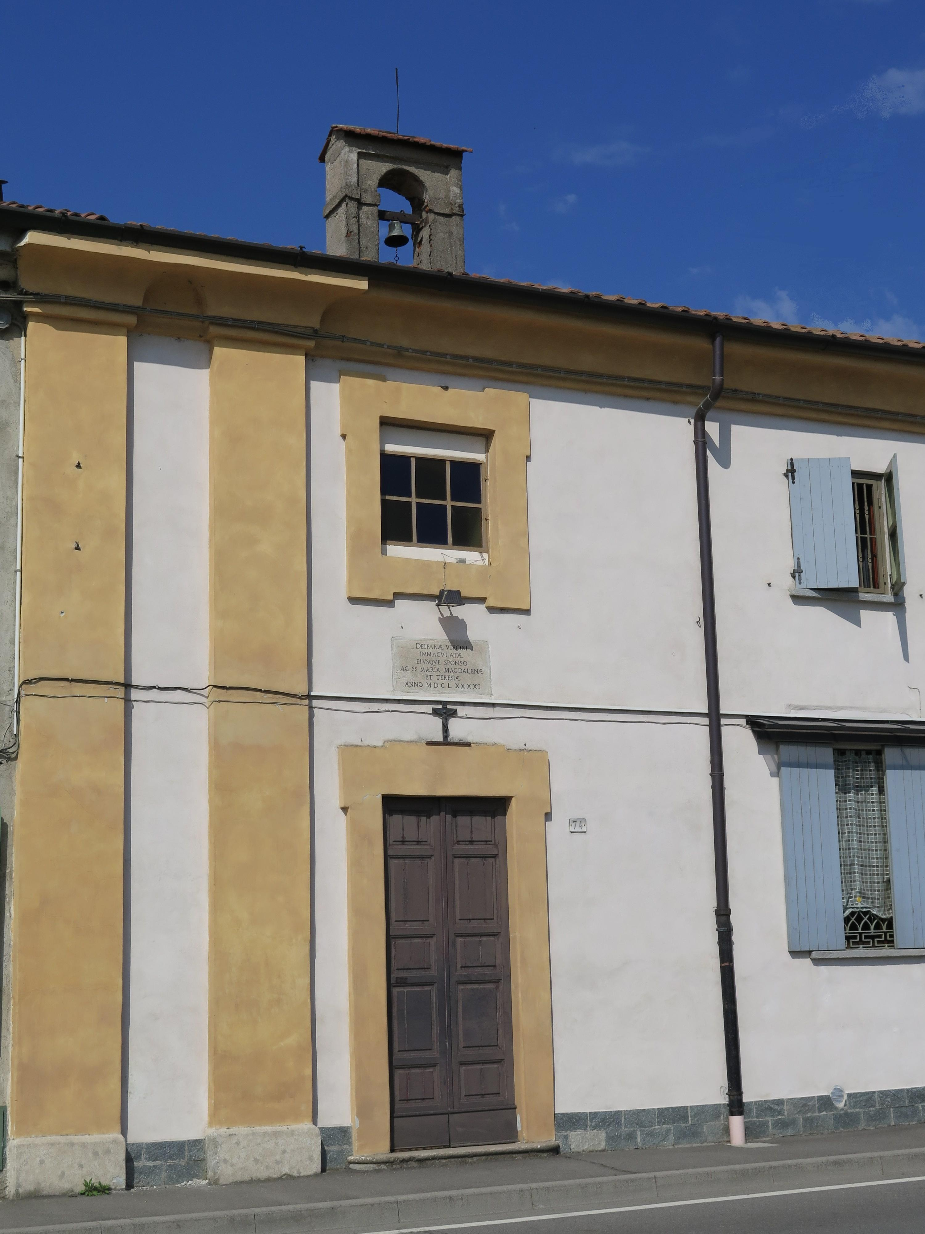 Chiesa di Santa Maria Immacolata presso la Cascina Increa - Brugherio This file was uploaded as part of WiBrugherio, a project by Comune di Brugherio in cooperation with Wikimedia Italia.